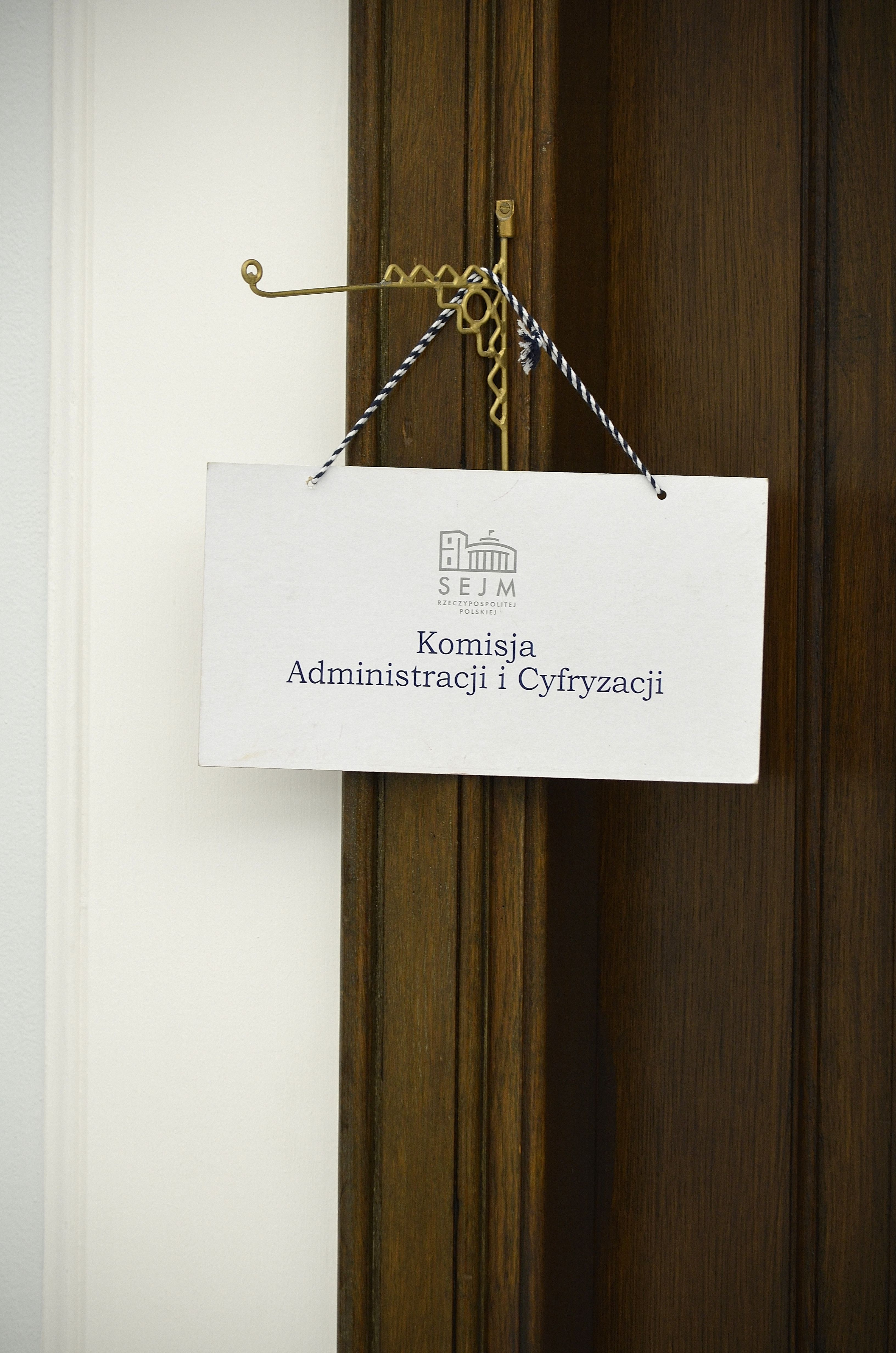 Wywieszka informująca o trwającym posiedzeniu Komisji Administracji i Cyfryzacji